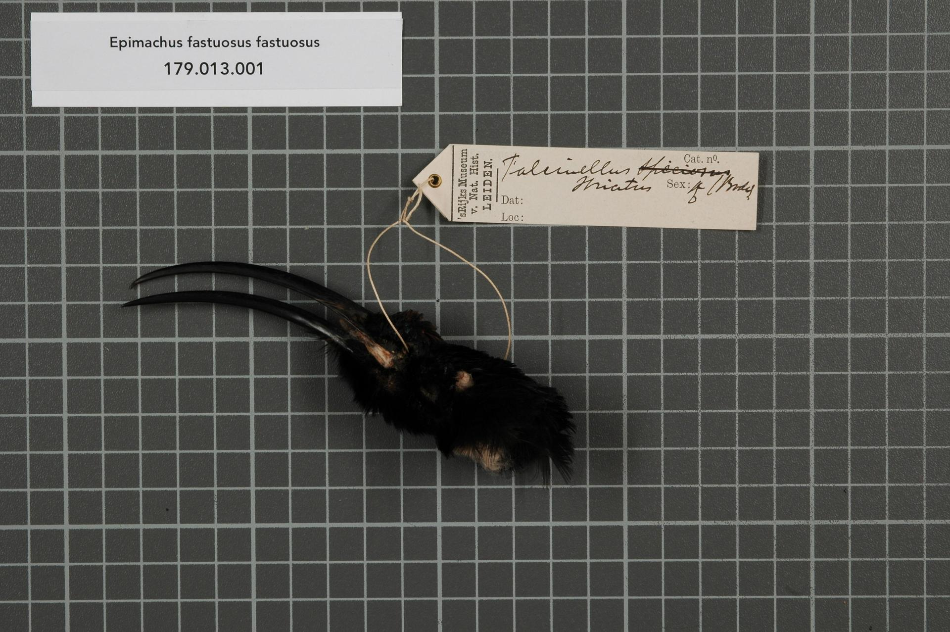 Epimachus fastuosus fastuosus (Hermann, 1783)